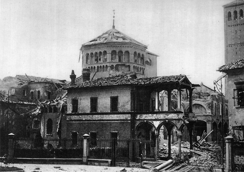 La distruzione di Sant'Ambrogio a Milano per opera dei bombardamenti anglo-americani della Seconda guerra mondiale nel 1943. Scansione di una foto non artistica il cui autore è sconosciuto.